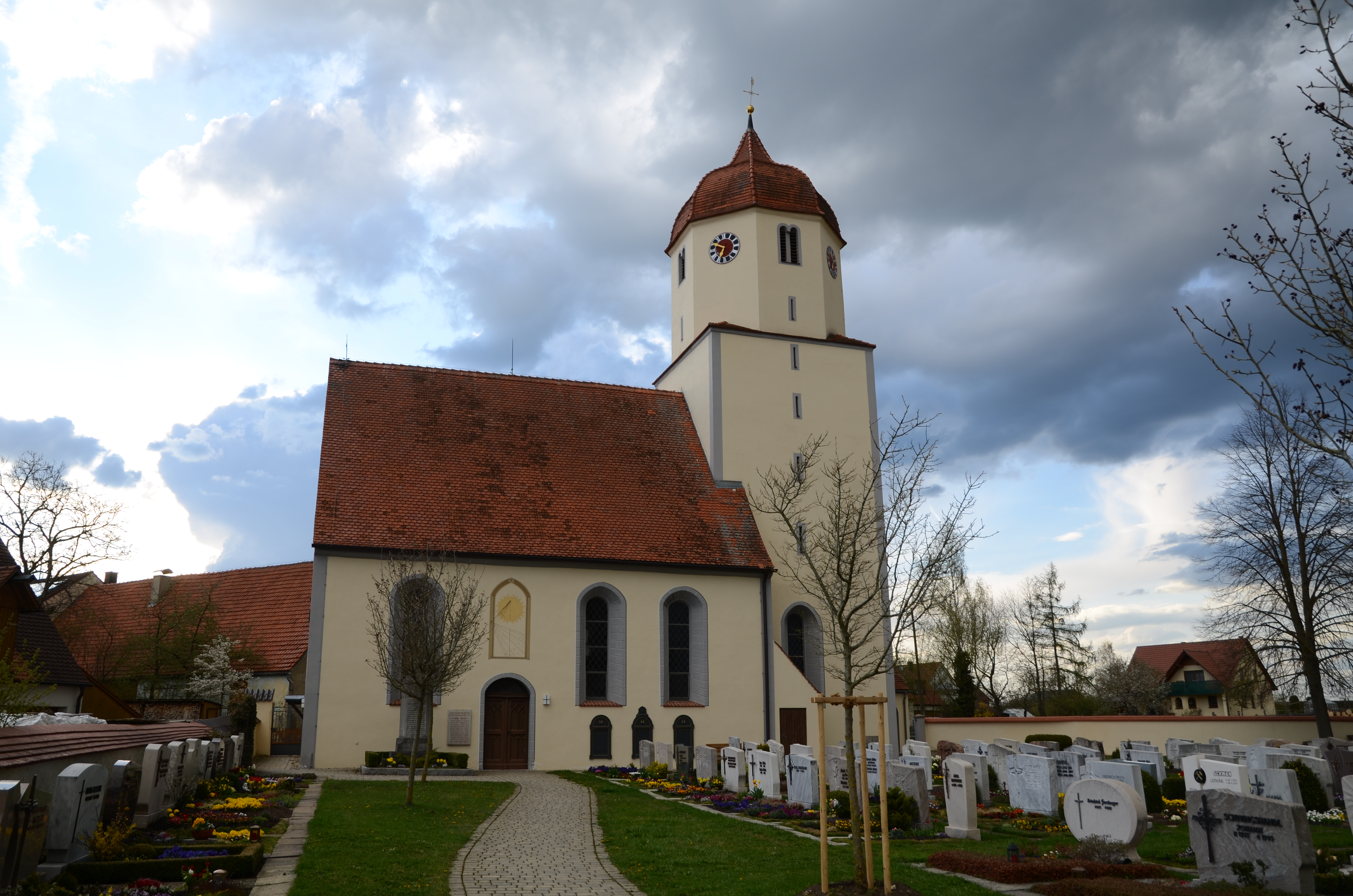 evang.-luth. Kirche St. Ägidius in Balgheim